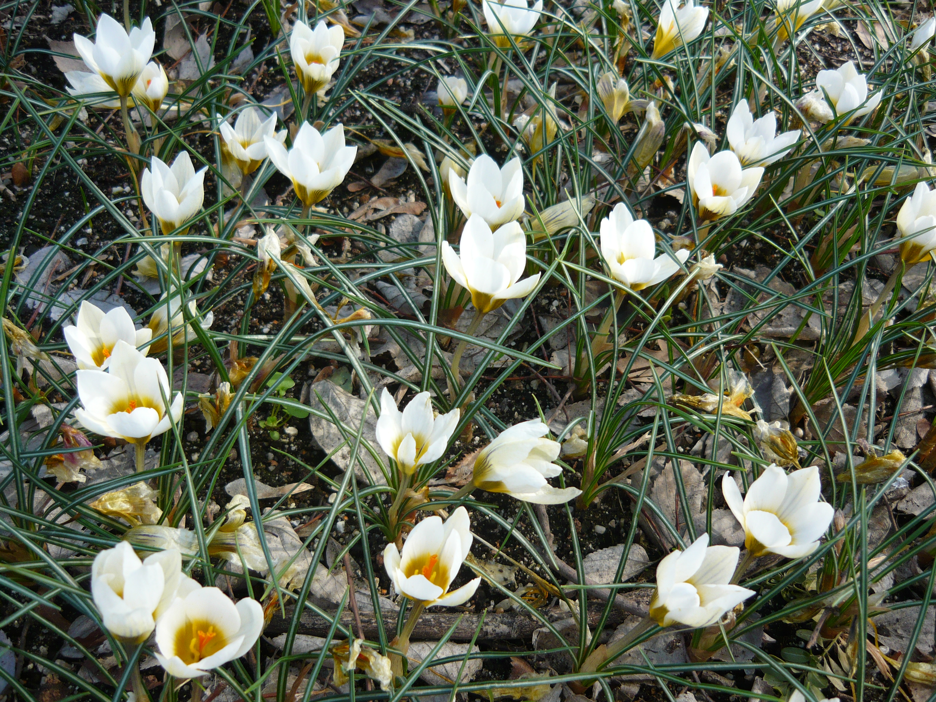 Crocus chrysanthus 'Snowbunting'. Real Jardín Botánico de Madrid.